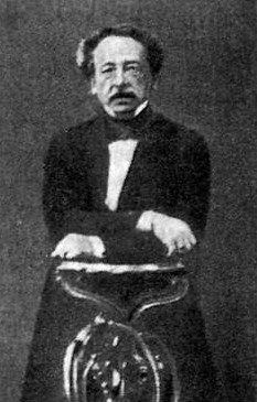 Князь Петр Иванович Мещерский (29.05.1802—15.04.1876)